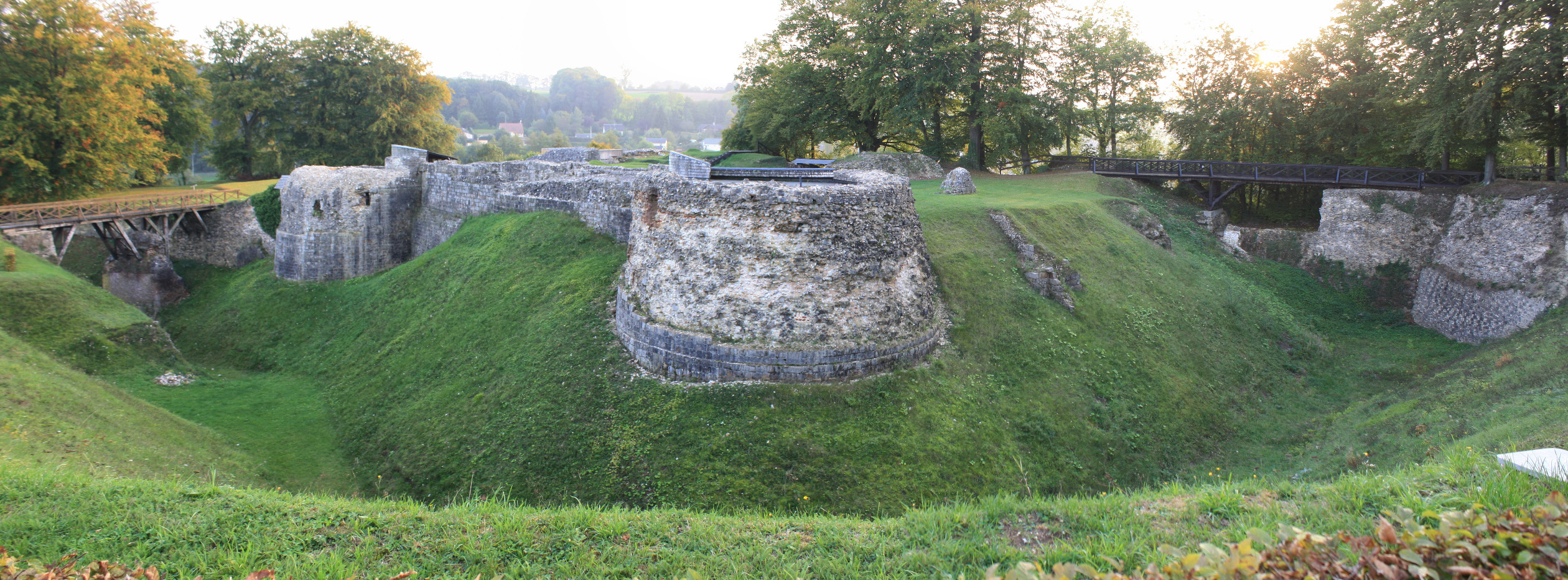 Vue des ruines du château médiéval surplombant le village de Blainville Crevon (76116) PA00100559